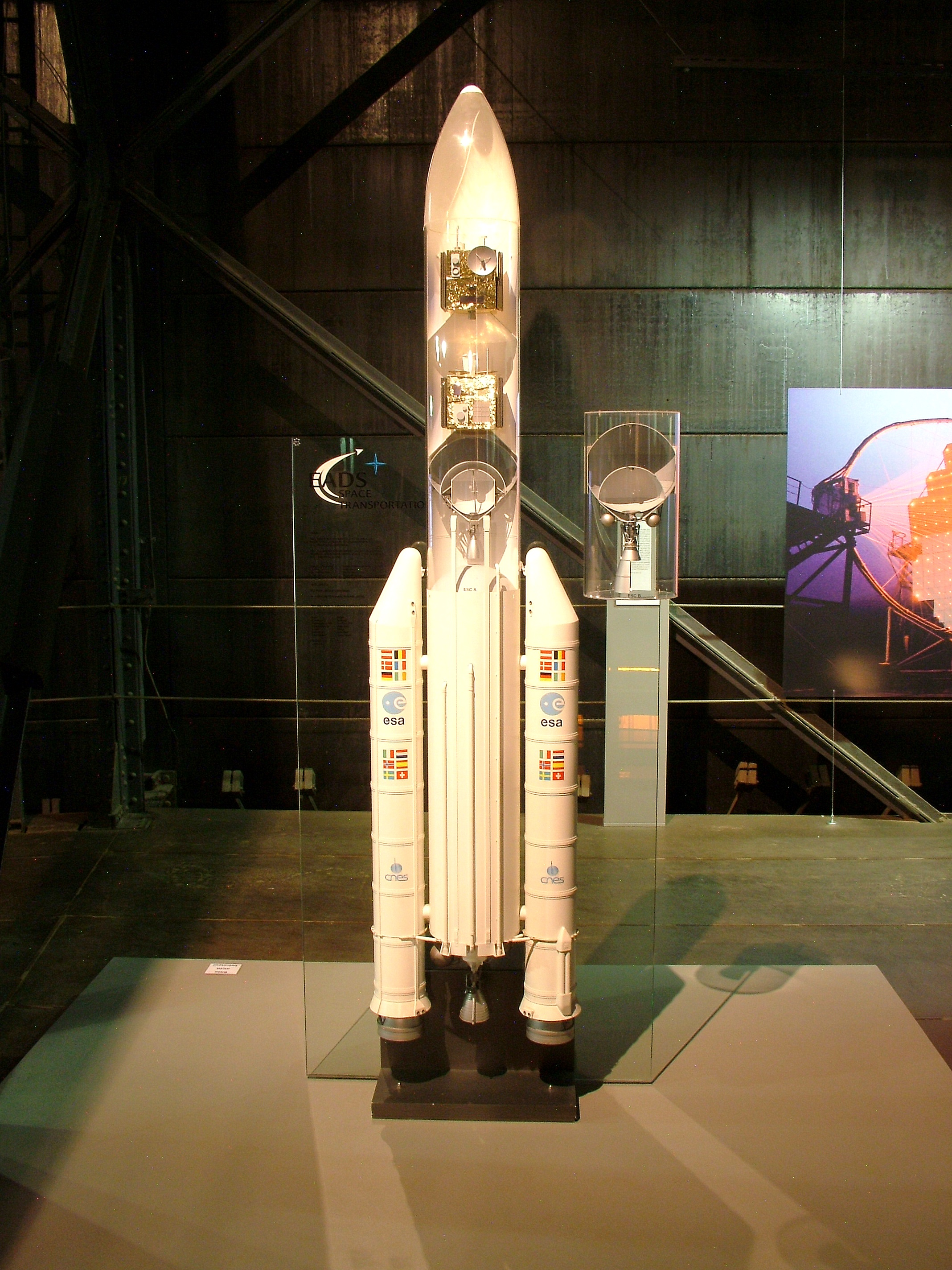 Model of Ariane 5 rocket, by EADS, in exhibition "Sternstunden" in Oberhausen.